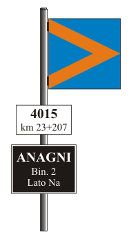 Segnali Ferroviari